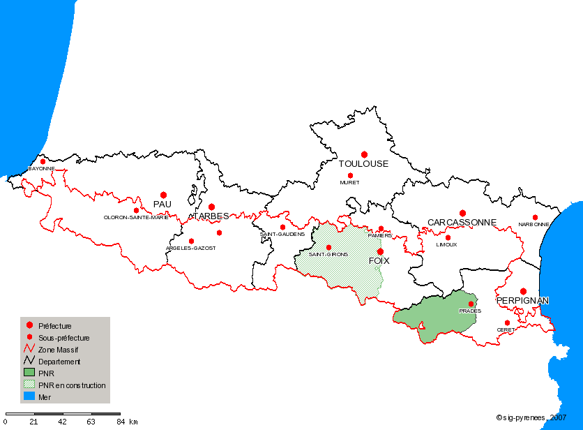 Carte de localisation des Parcs Naturels Régionaux (PNR) dans les Pyrénées